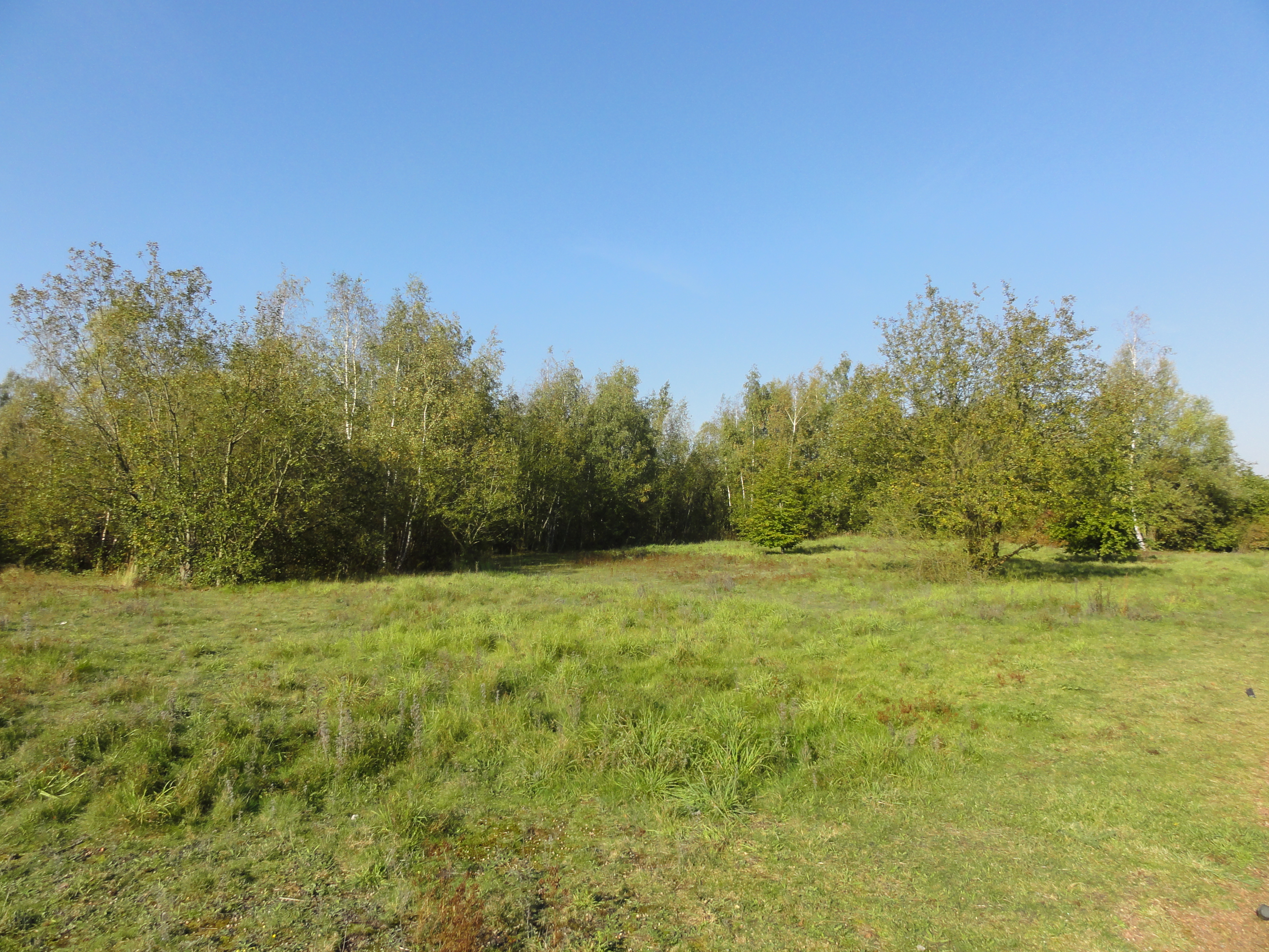 Terril n° 118 dit 1 d'Oignies, Fosse n° 1 de la Compagnie des mines d'Ostricourt, Oignies, Pas-de-Calais, Nord-Pas-de-Calais, France.